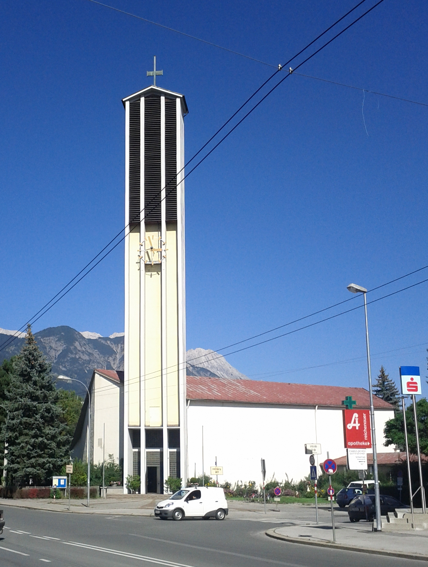 Landesgedächtniskirche hl. Paulus mit Pfarrhaus